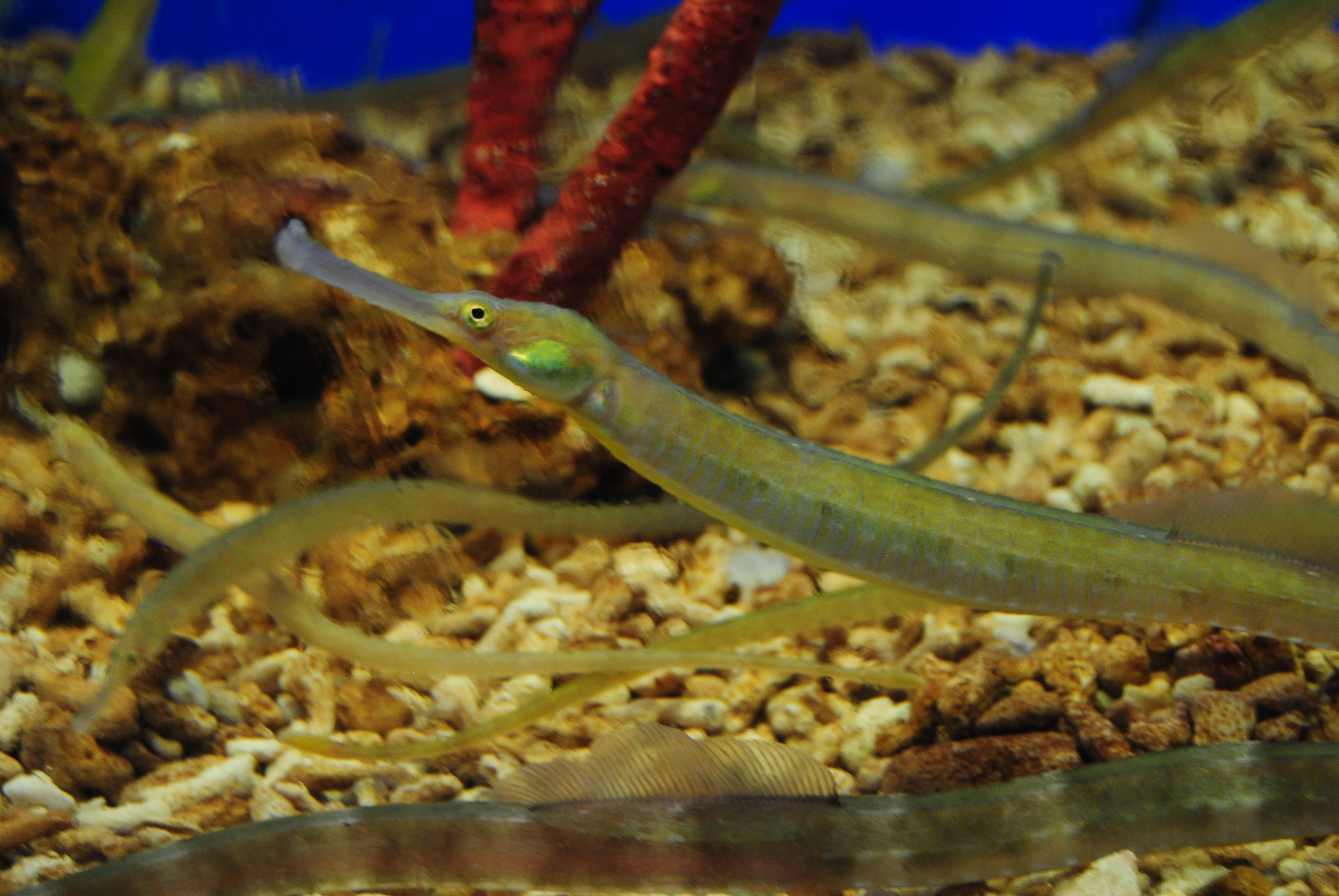 syngnatus acus in Sealife Blankenberge